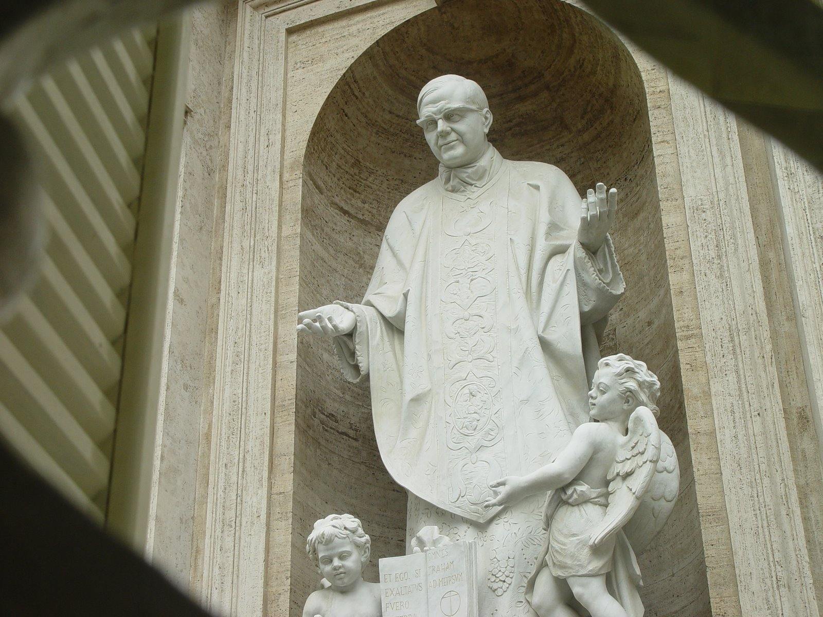 św. Josemaria Escriva na Watykanie